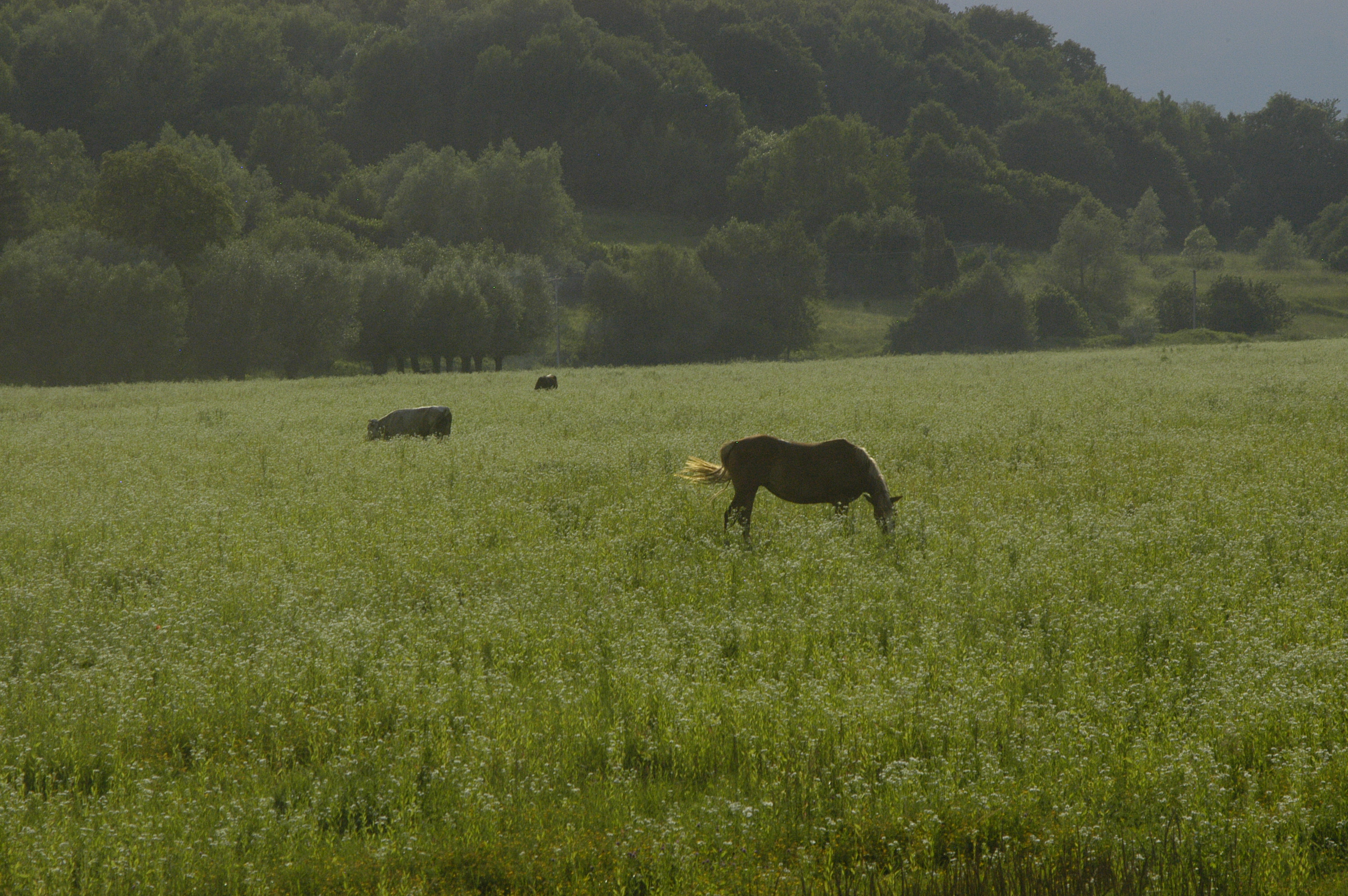 Прикарпатські луки